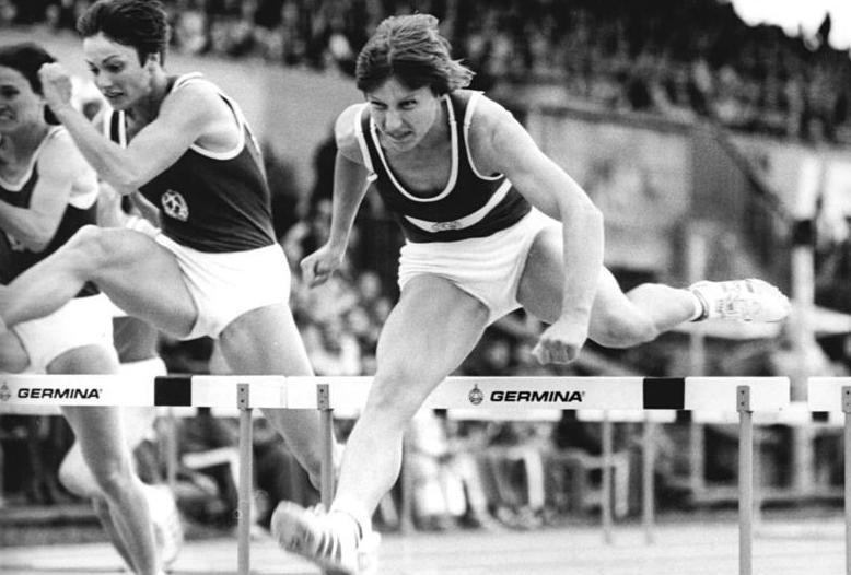 Bettine Jahn, Kerstin Knabe ADN-ZB Häßler 17.6.83-re Karl-Marx-Stadt: 34. DDR-Meisterschaften in der Leichtathletik - 1.Tag- Über 100 m Hürden sorgte Titelverteidigerin Bettine Jahn (SC Karl-Marx-Stadt- rechts) in 12,58 s für ein sehr gutes Resultat. Sie verwies Kerstin Knabe (SC DHfK Leipzig- 2.v.r.) auf den zweiten Platz (12,75 s).